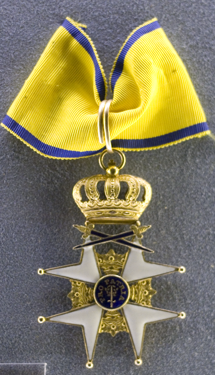 Riddare med Stora Korset av Kungl. Svärdsorden.